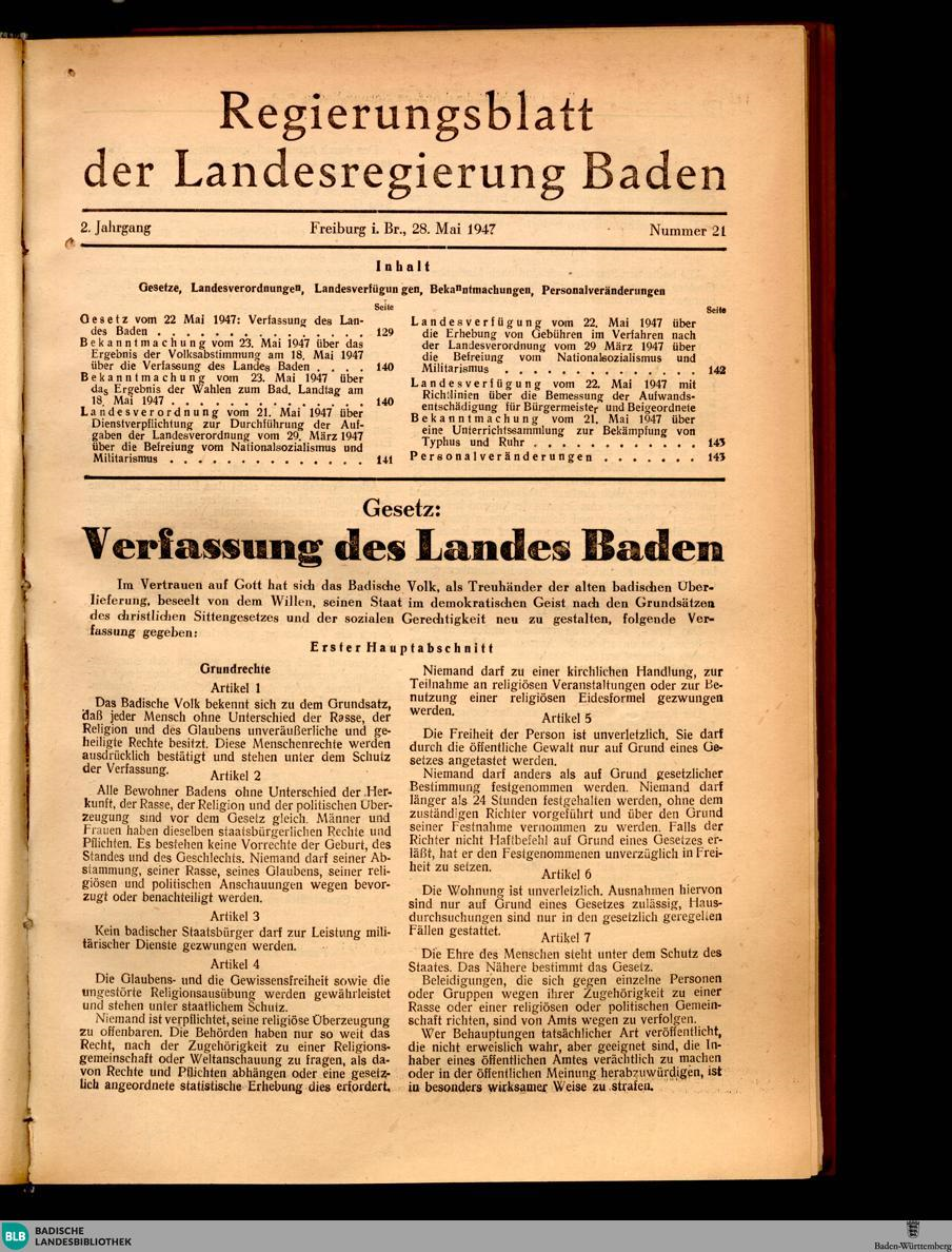 Titel "Regierungsblatt der Landesregierung Baden" vom 28. Mai 1947 mit der Verfassung